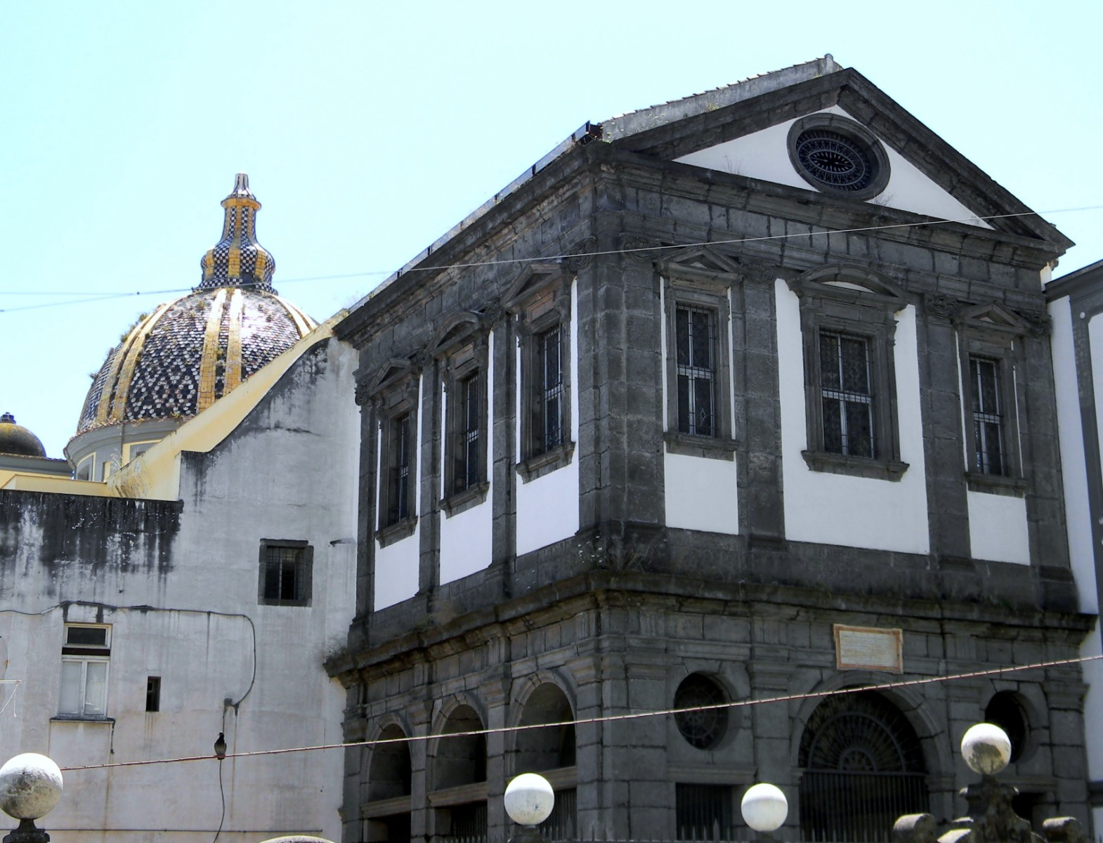 La facciata esterna e la Cupola della chiesa dei Santi Marcellino e festo di Napoli.